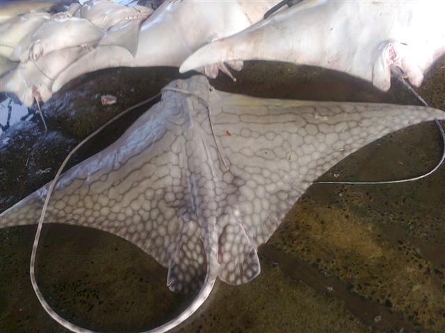 Скат рода летучих скатов